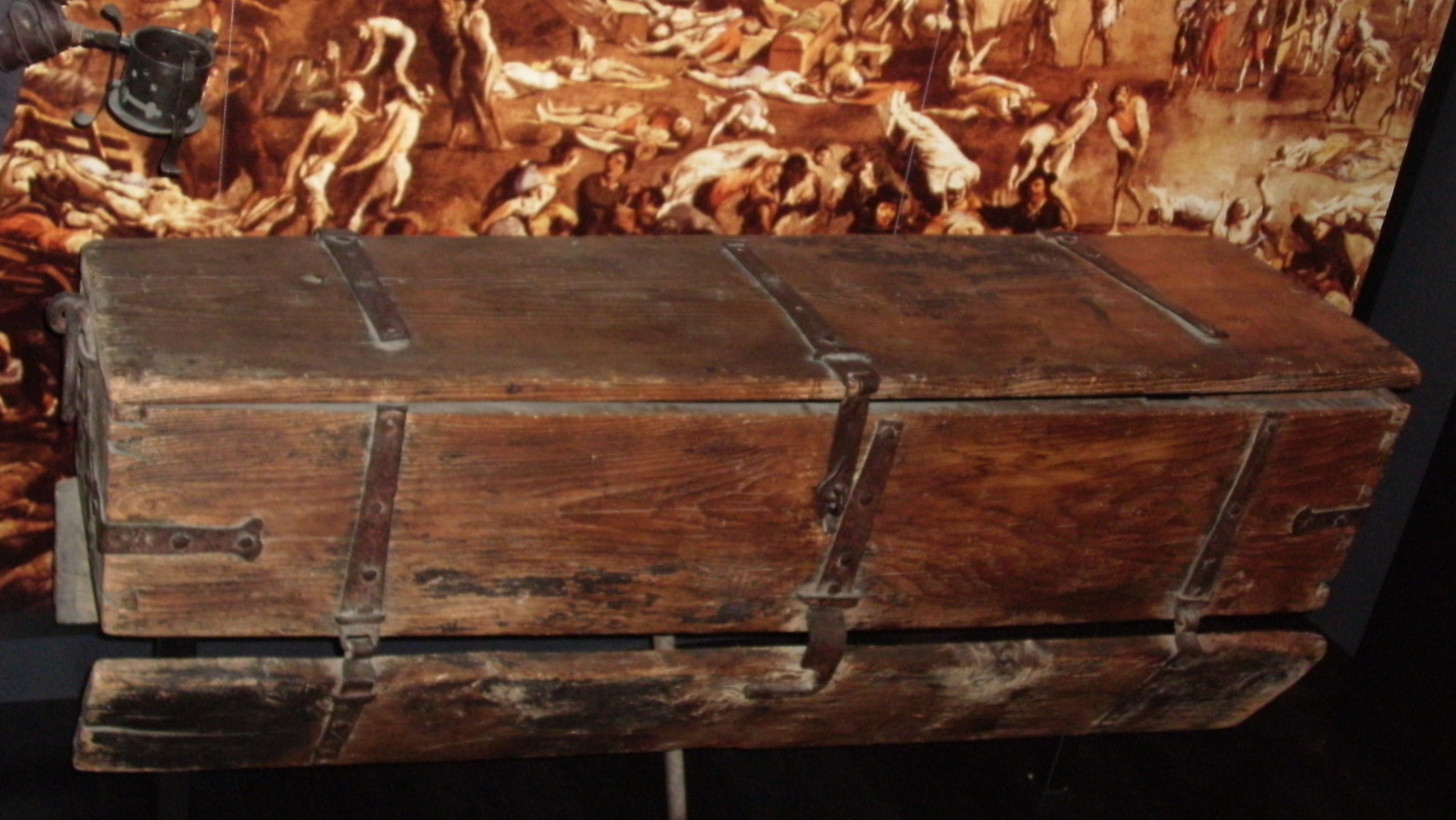 Zürich, Medizinhistorisches Archiv der Universität Zürich, Hirschengraben 82